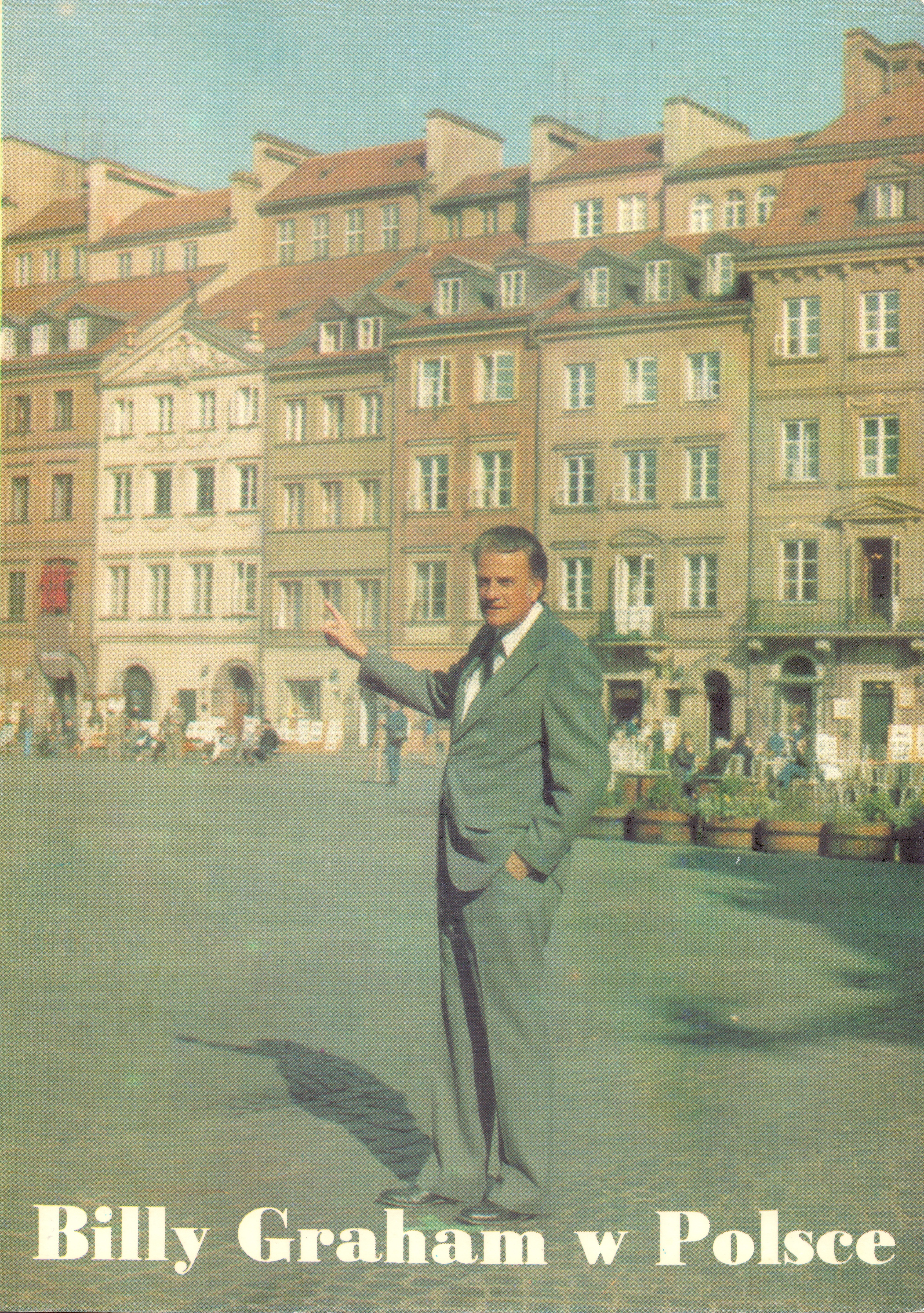 okładka książki "Billy Graham w Polsce". Michał Stankiewicz (red.). Warszawa: Słowo Prawdy, 1979